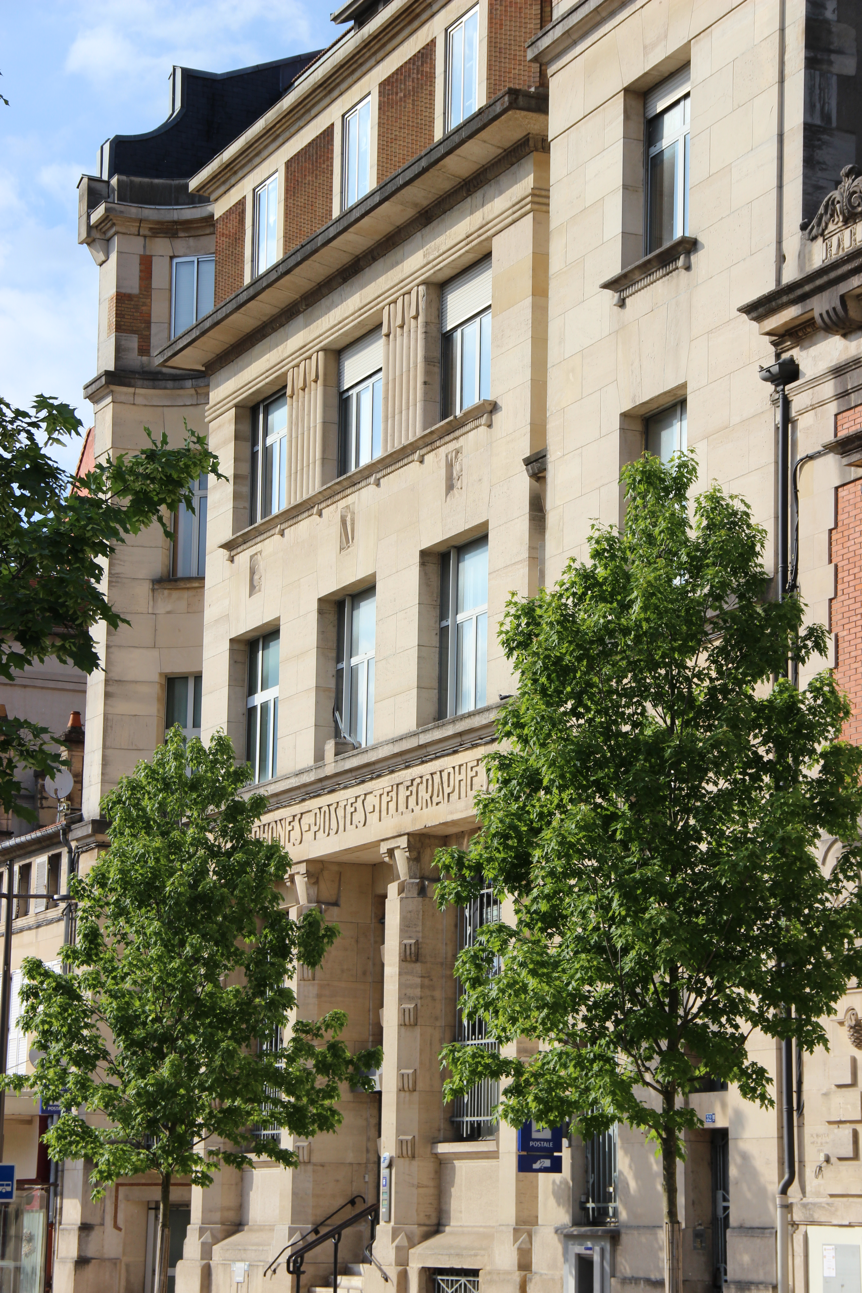 La poste centrale, boulevard de la Rochelle.